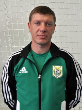 Морозов Анатолий Николаевич